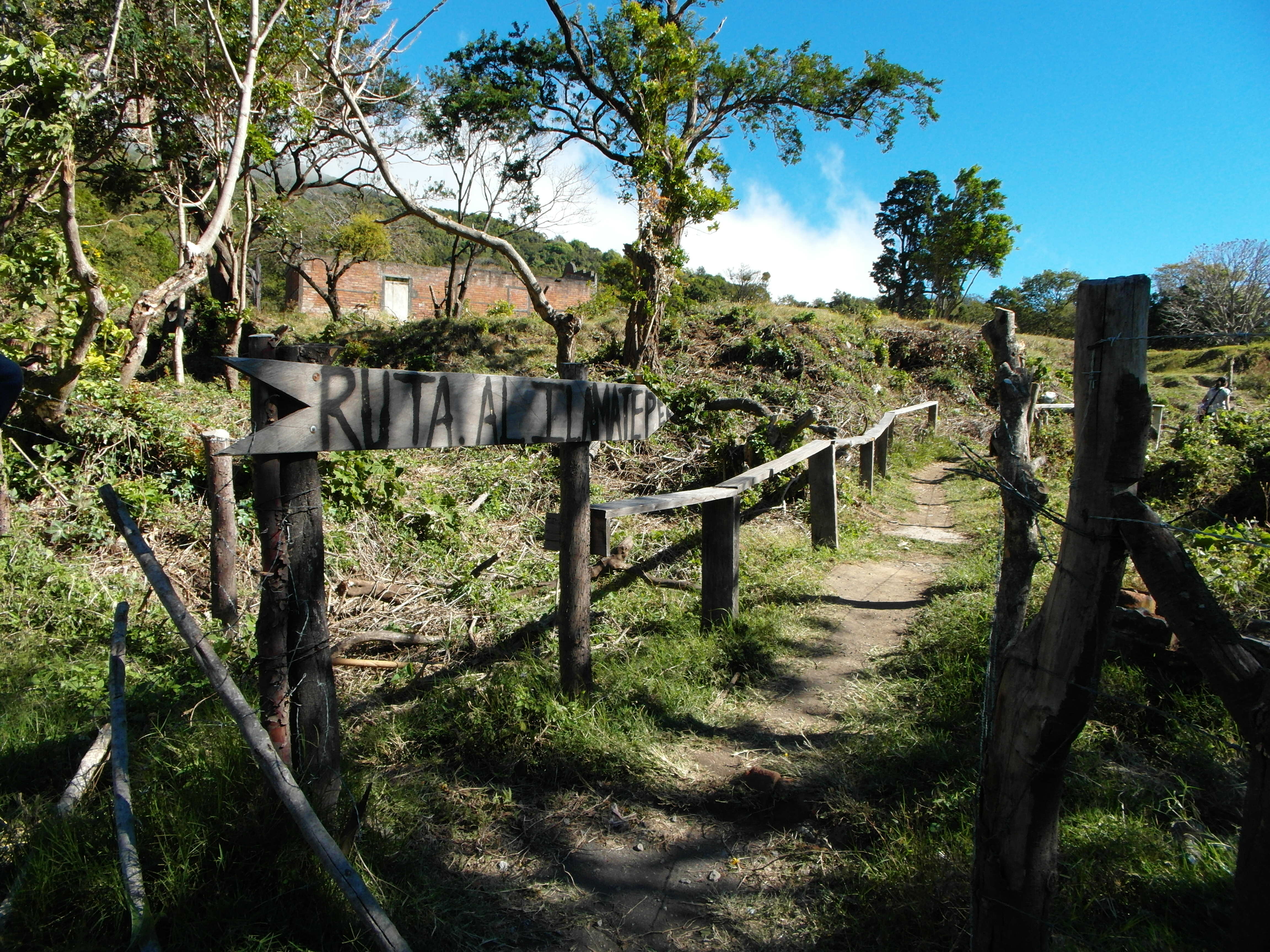 sendero al crater del ilamatepec